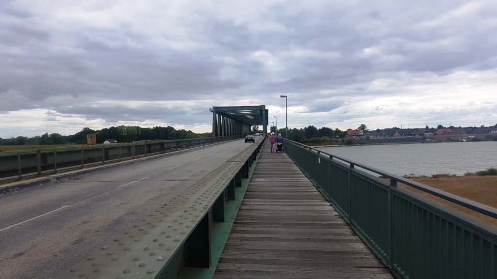 Elbbrücke Lauenburg most nad Łabą w Lauenburgu 2018